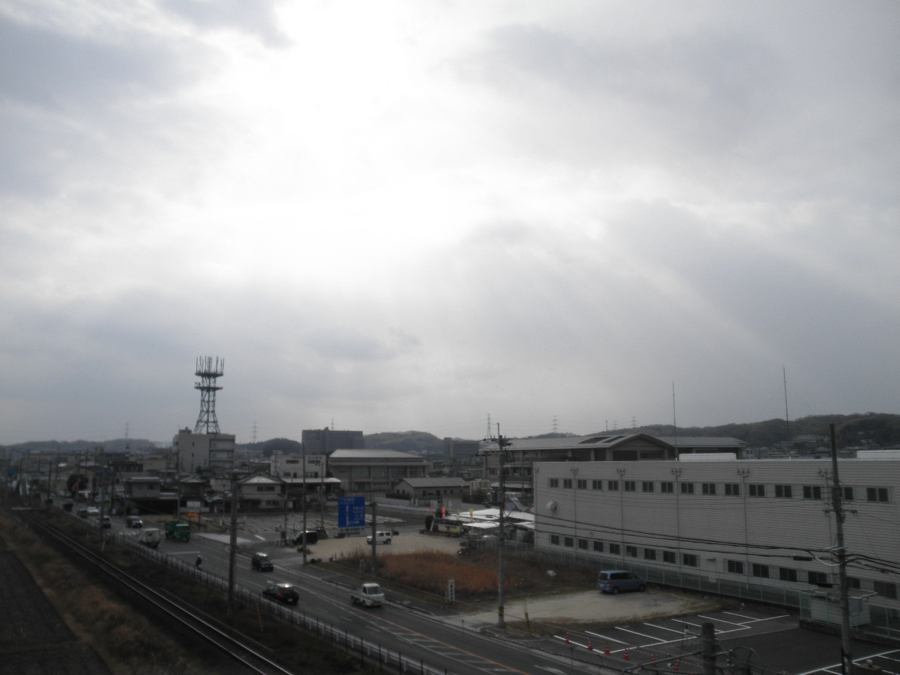 精華町市街地